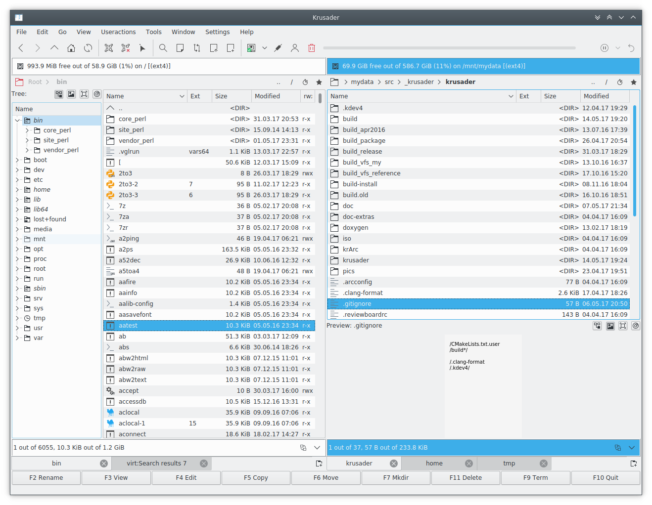 Krusader 2.6 Hauptfenster